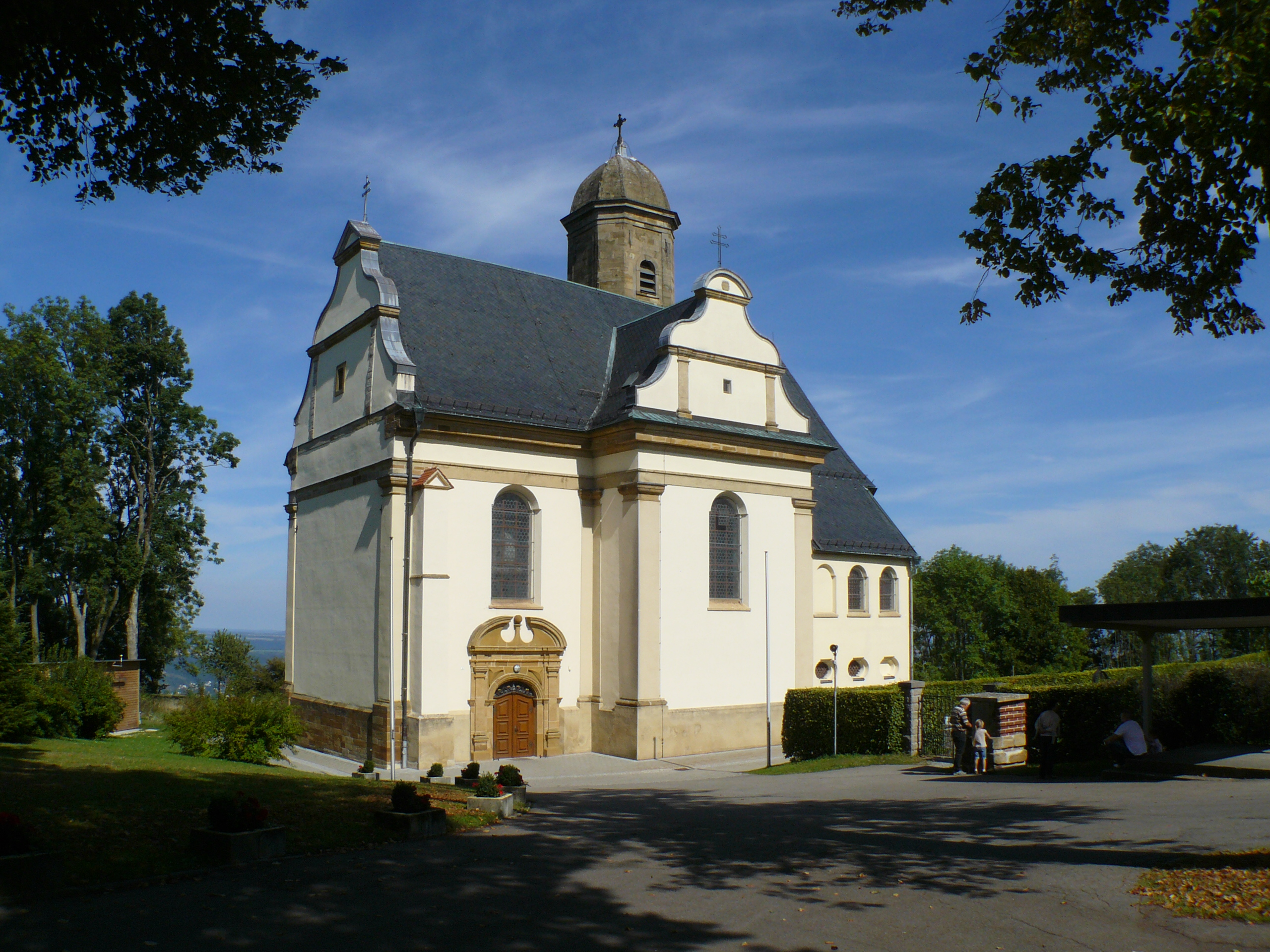 Wallfahrts- und Pfarrkirche St. Maria auf dem Hohenrechberg bei Schwäbisch Gmünd